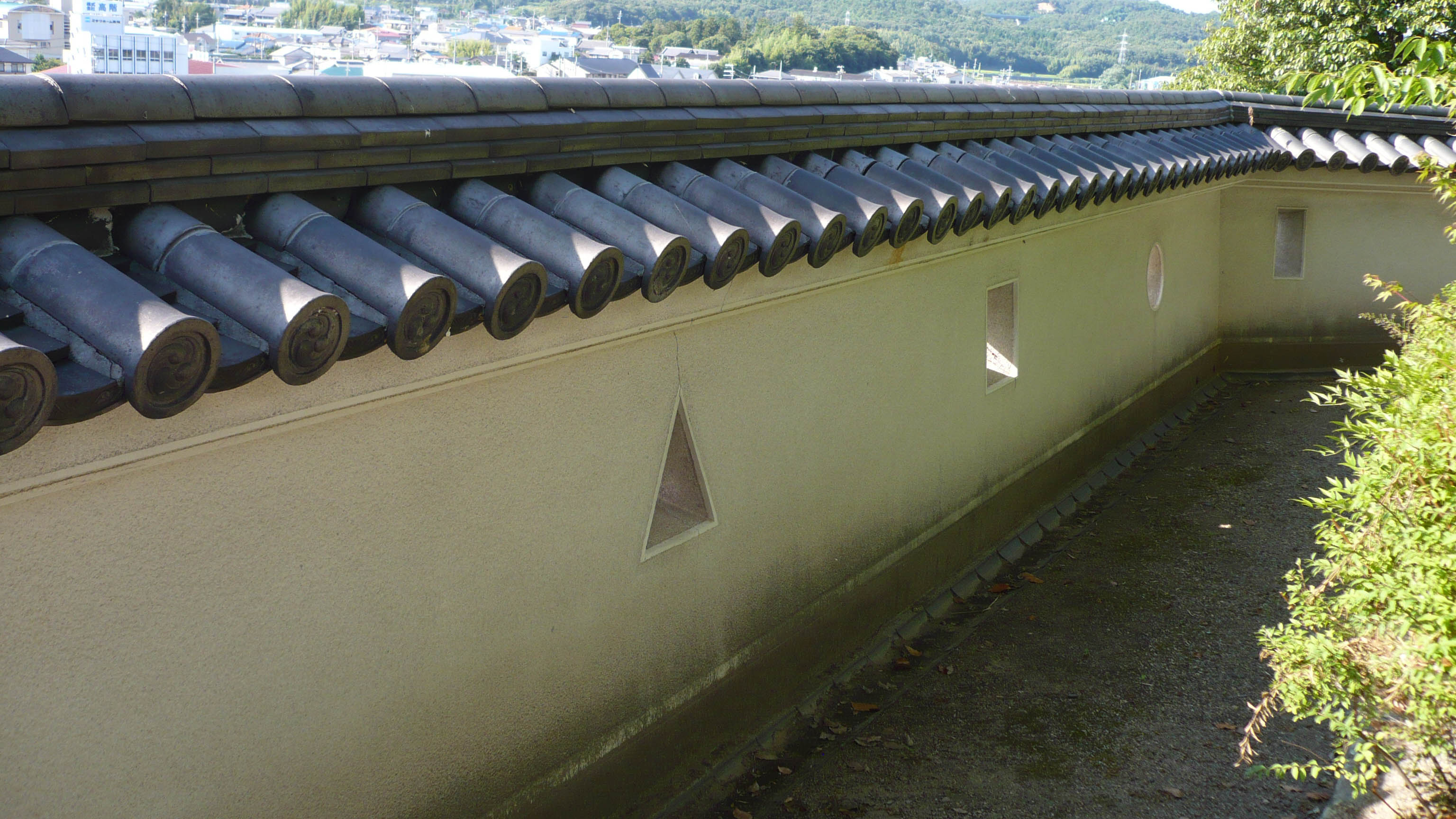 復興塀